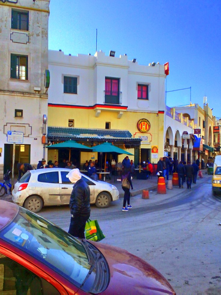 Bab Souika, Tunis باب سويقة ، تونس العاصمة